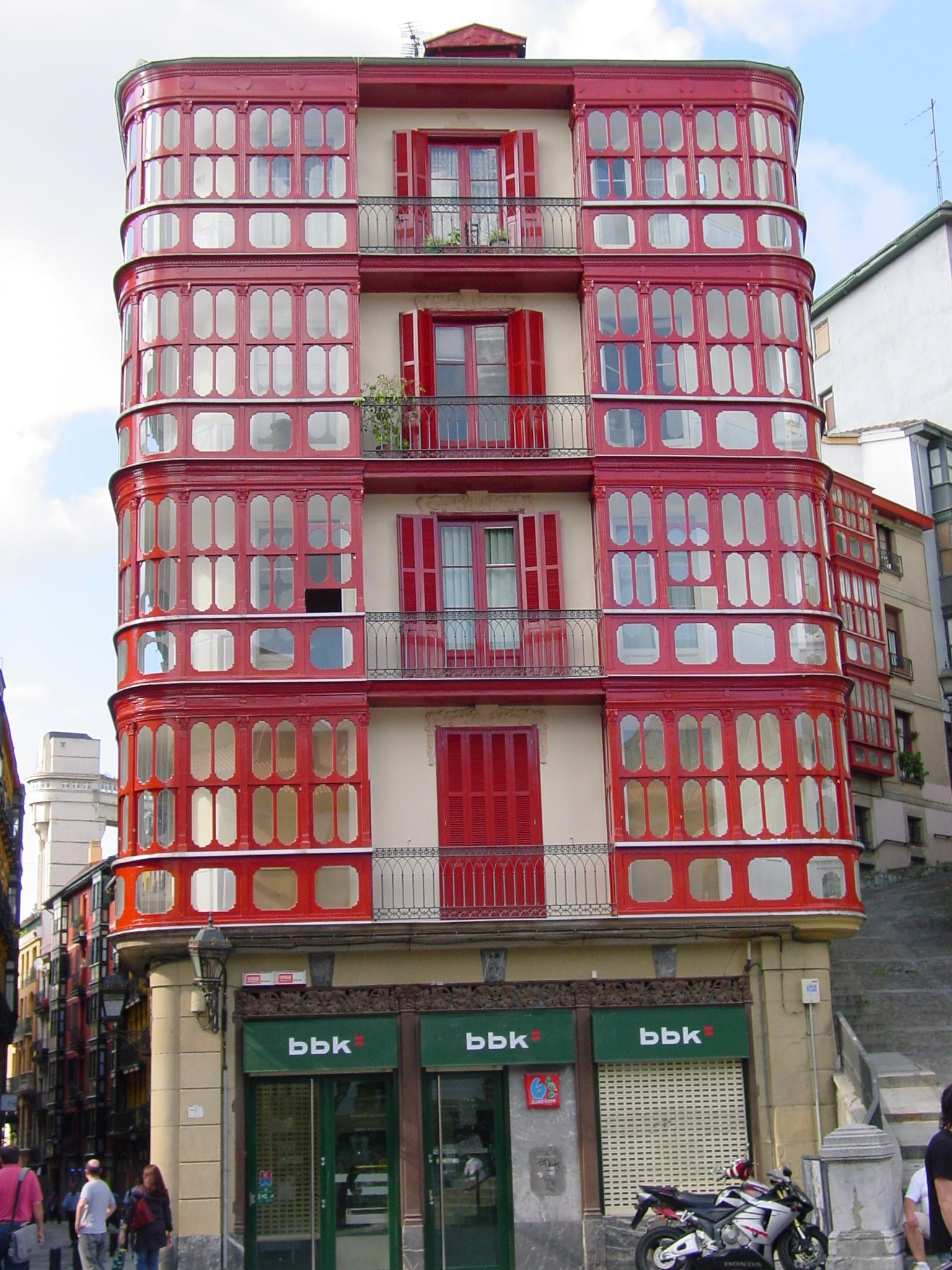 Immeuble remarquable se situant place Miguel de Unamuno à Bilbao.